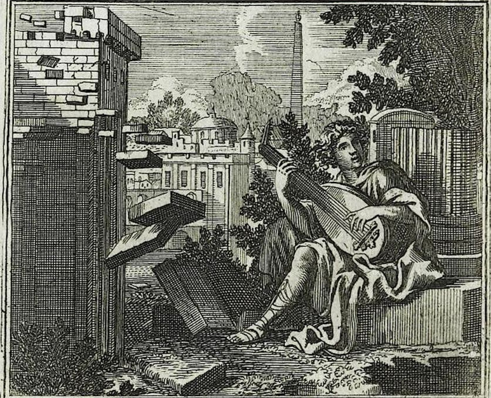 Amphion, der Niobe Ehmann war ein vortrefflicher Musicant; und bauete die Mauren der Stadt Thebæ durch den Klang seines Seiten=Spieles und seiner Stimme, ohne das er Maurer, Steinmetzen und Baumeister darzu brauchen dörffen Abb. in: Krauss, Johann Ulrich: Die Verwandlungen des Ovidii in zweyhundert und sechs und zwantzig Kupffern. In Verlegung Johann Ulrich Krauß, Kupferstechern in Augspurg [ca. 1690]; fol. 98